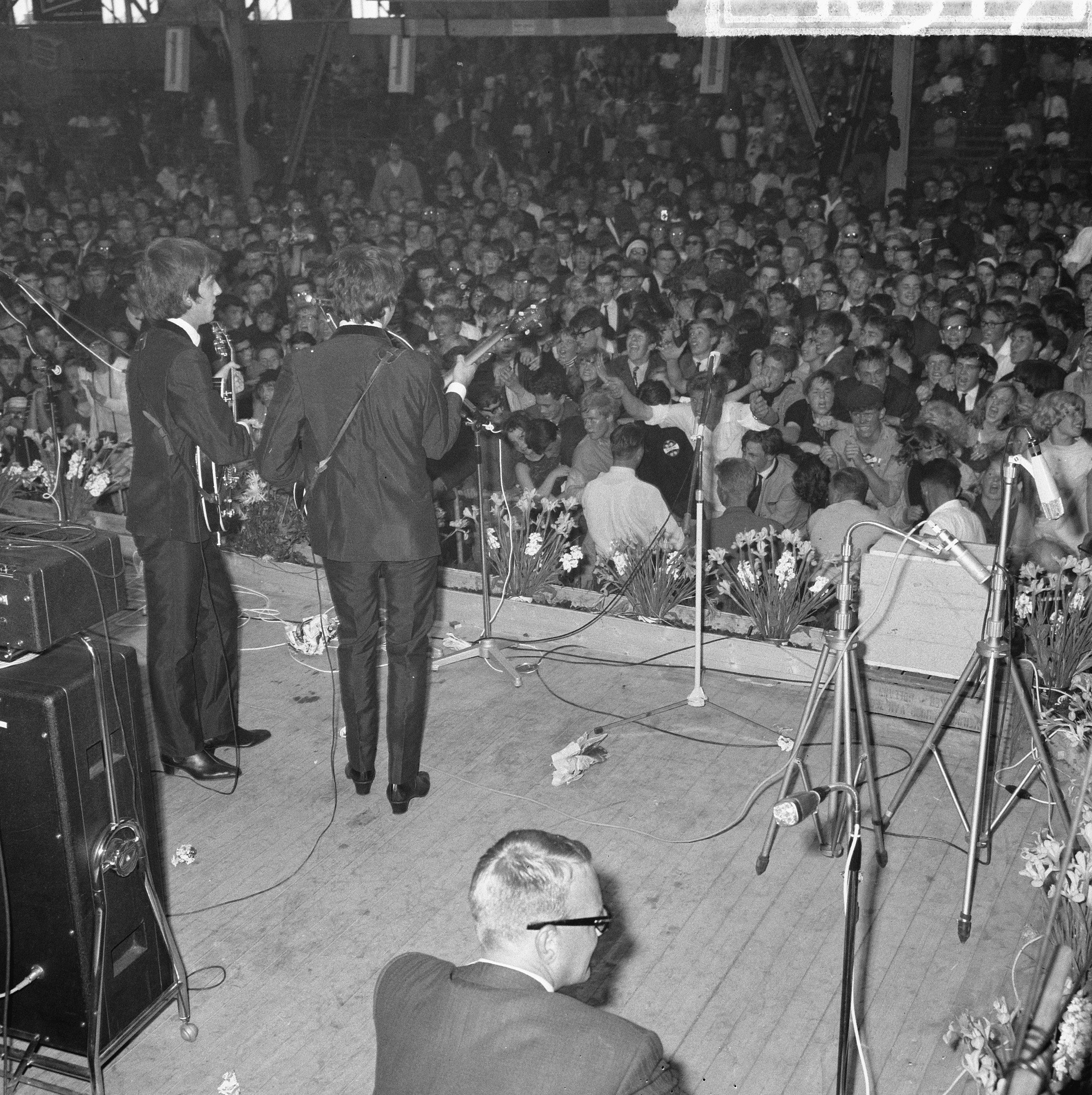 Collectie / Archief : Fotocollectie Anefo Reportage / Serie : [ onbekend ] Beschrijving : Beatles in ons land, hun optreden in de veilinghal te Blokker, publiek Datum : 7 juni 1964 Locatie : Blokker Trefwoorden : Optredens, publiek, veilinghallen Instellingsnaam : Beatles Fotograaf : Nijs, Jac. de / Anefo Auteursrechthebbende : Nationaal Archief Materiaalsoort : Negatief (zwart/wit) Nummer archiefinventaris : bekijk toegang 2.24.01.03 Bestanddeelnummer : 916-5171